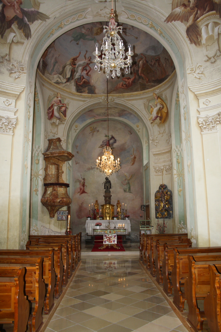 Innenansicht der Filial- und Wallfahrtskirche Dornau (Thenneberg) in der niederösterreichischen Gemeinde Altenmarkt an der Triesting.